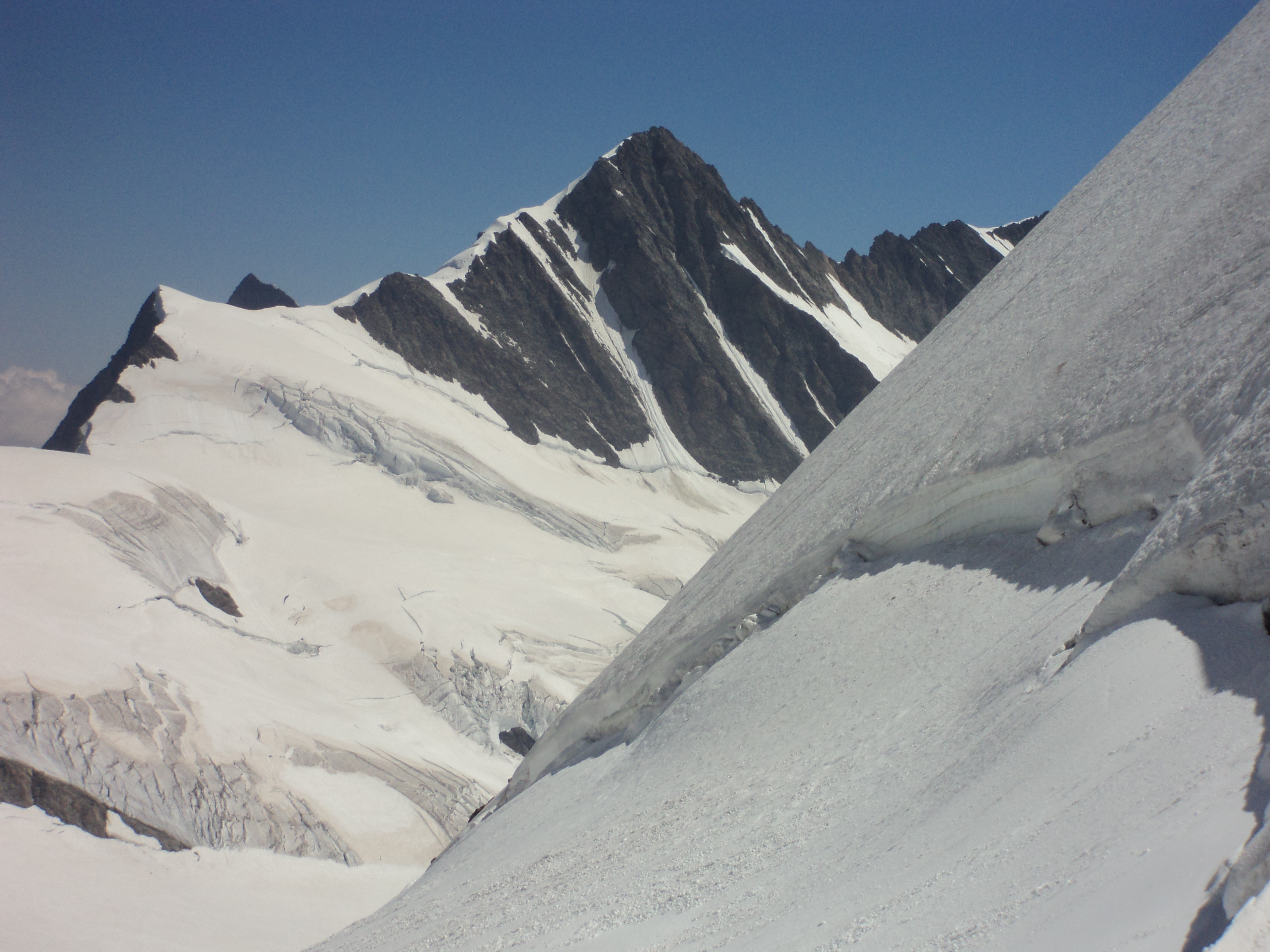 Il Gross Fiescherhorn visto dalla Mönchsjochhütte.